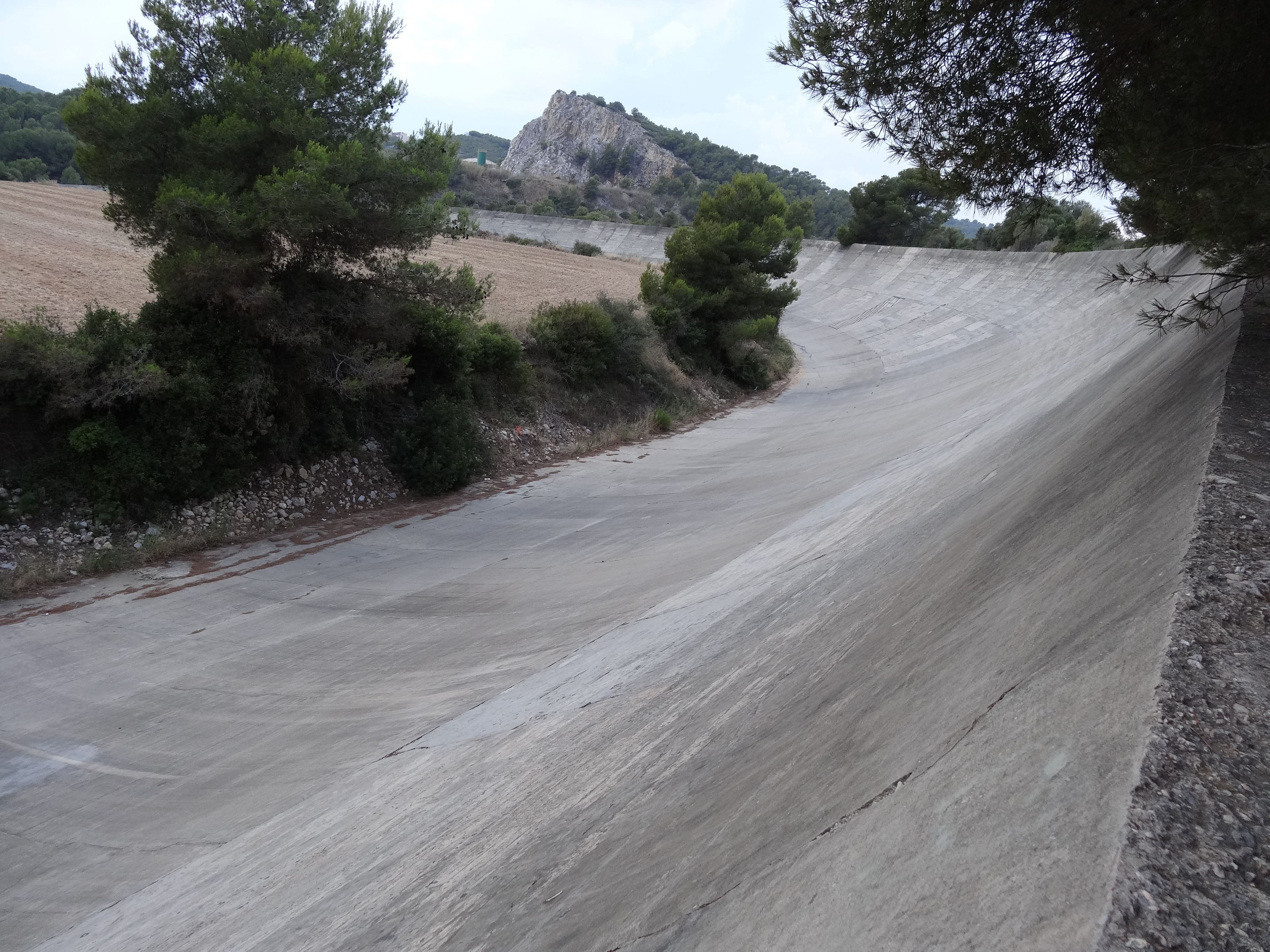 Autòdrom de Terramar, Sitges (juliol 2012)